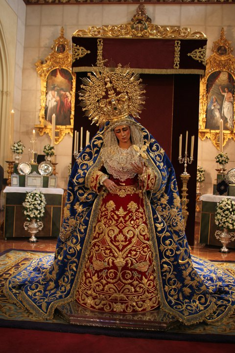 María de las Angustias Coronada Hermandad Sacramental de los Gitanos Sevilla. Besamanos 2011